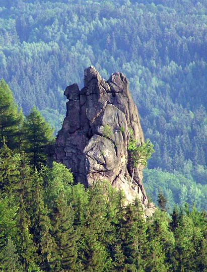 Skałka Jastrzębia Turnia na Krzyżnej Górze w Rudawach Janowickich nieopodal Karpnik. Widok z Sukiennic. Oświadczam, że jestem autorem zdjęcia i nadaję mu status PD. Andrzej Makarczuk